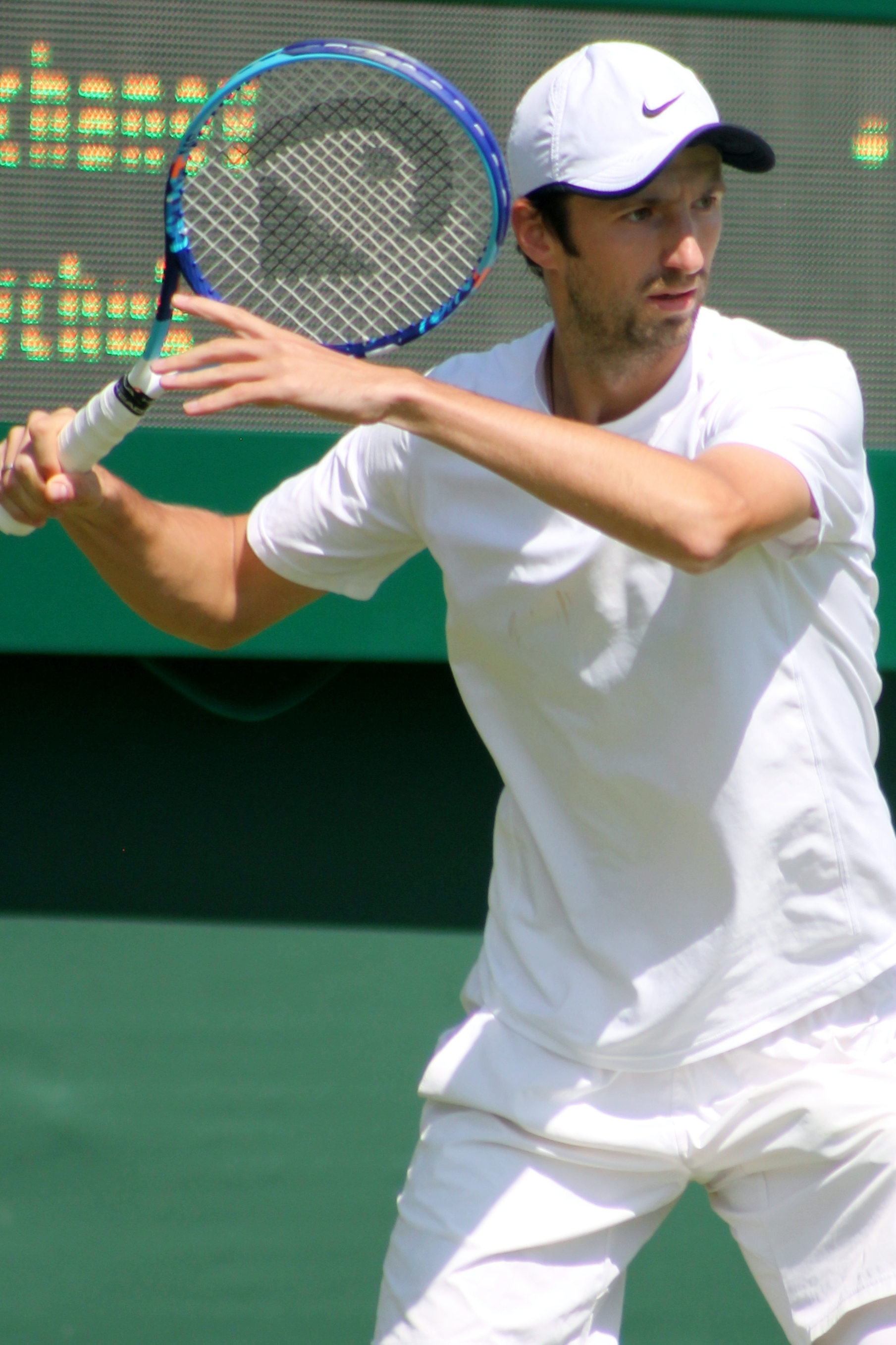 Kravchuk WMQ15 (2)